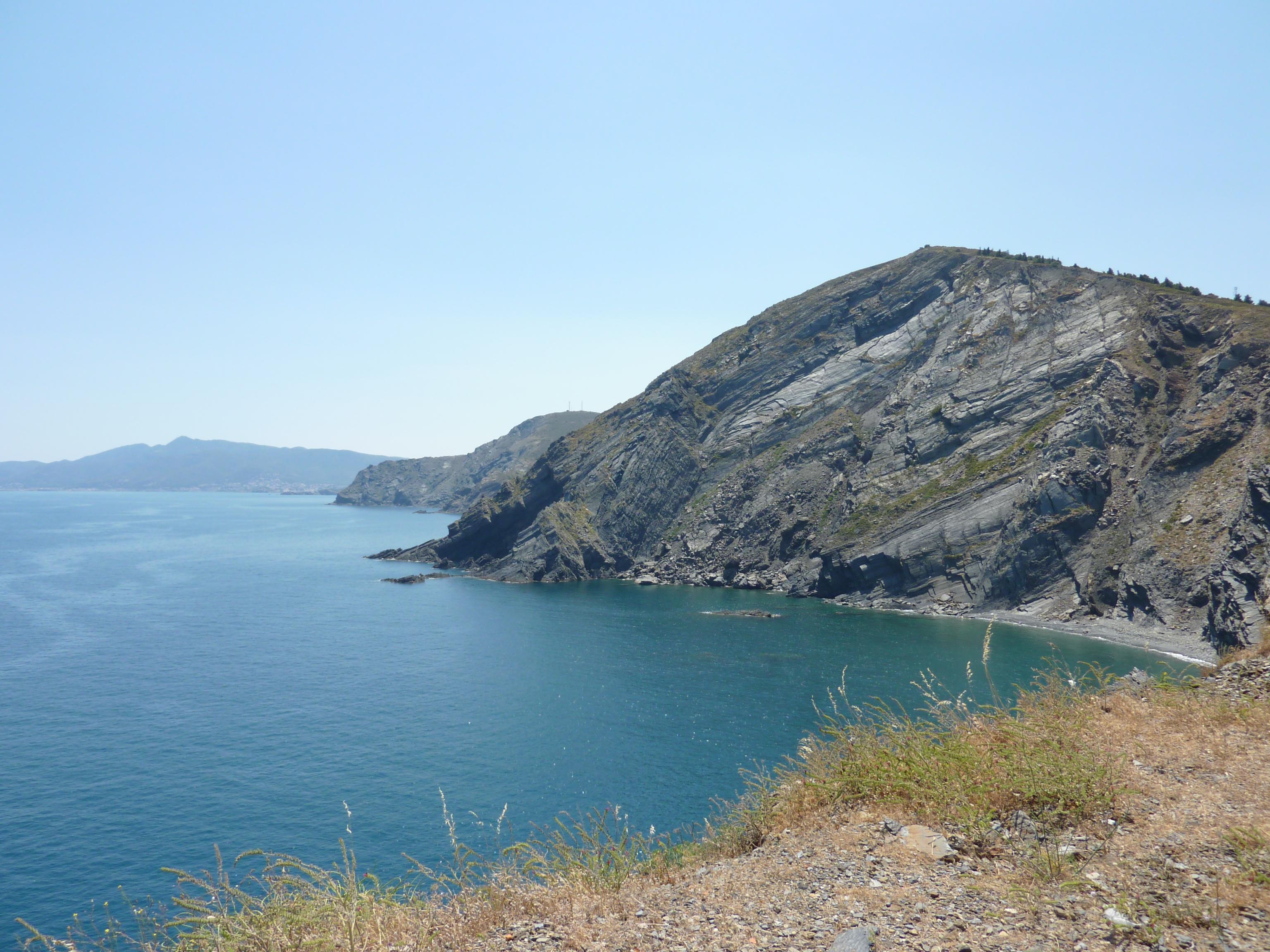 Pointe de l'Oiseau, Cerbère (Pyrénées-Orientales, Languedoc-Roussillon, France)